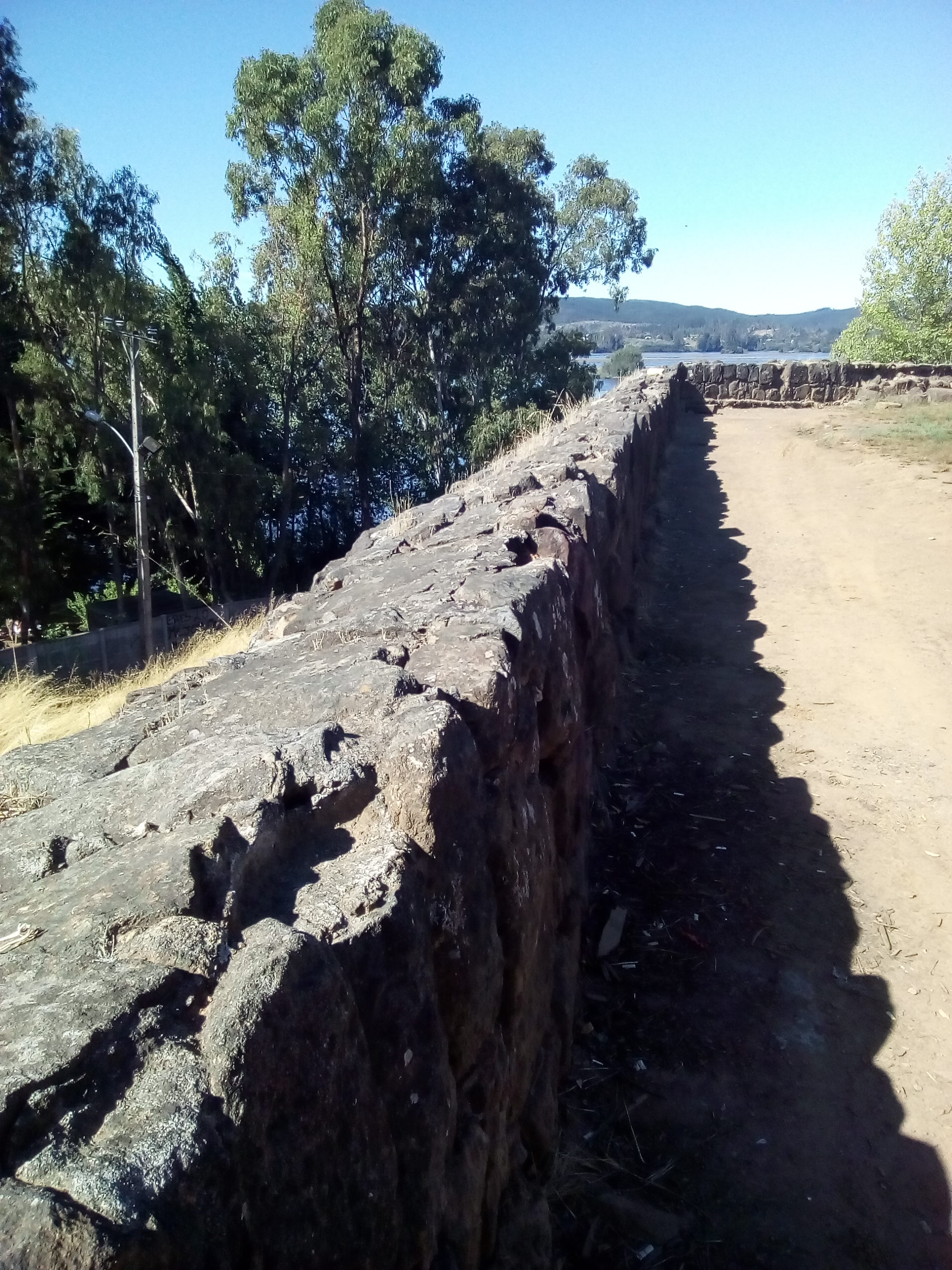 Distintas imágenes del Fuerte de Santa Juana y la laguna cercana.